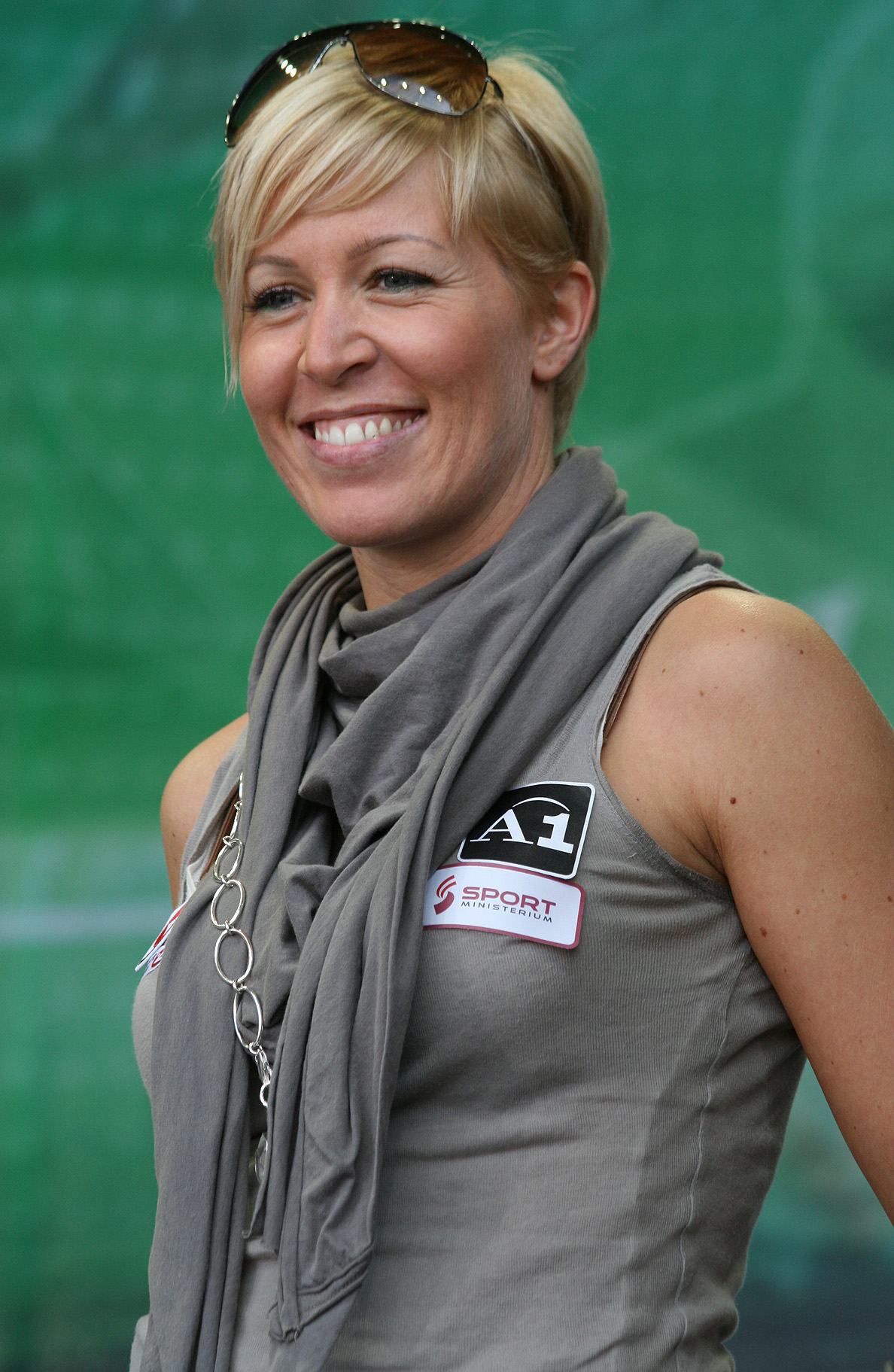 Heidi Neururer am Tag des Sports 2009 auf dem Heldenplatz in Wien